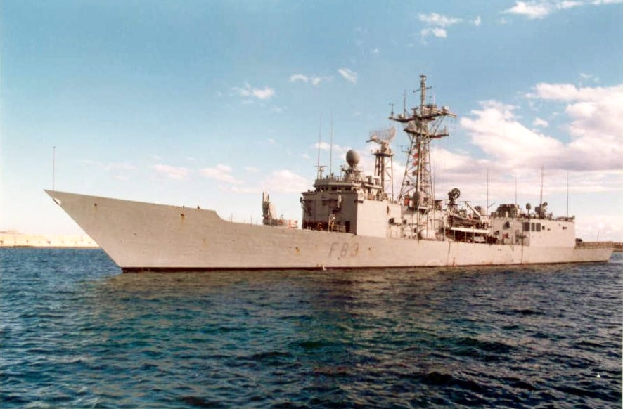 Fragata Numancia (F-83), de la Armada Española